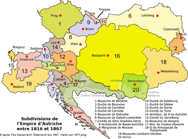 Subdivisions de l'Empire d'Autriche 1816-1867